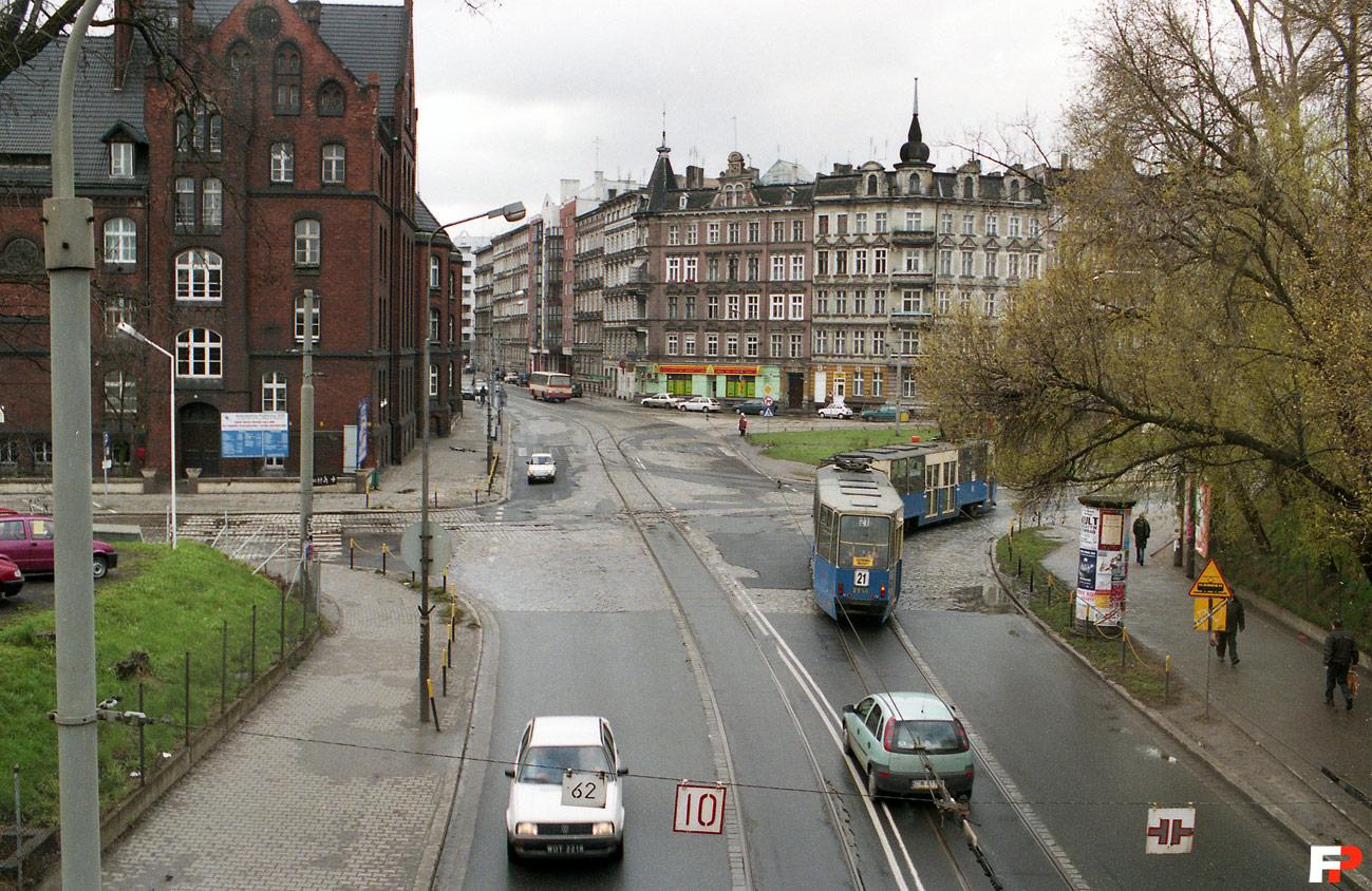 Plac Powstańców Wielkopolskich przed przebudową.